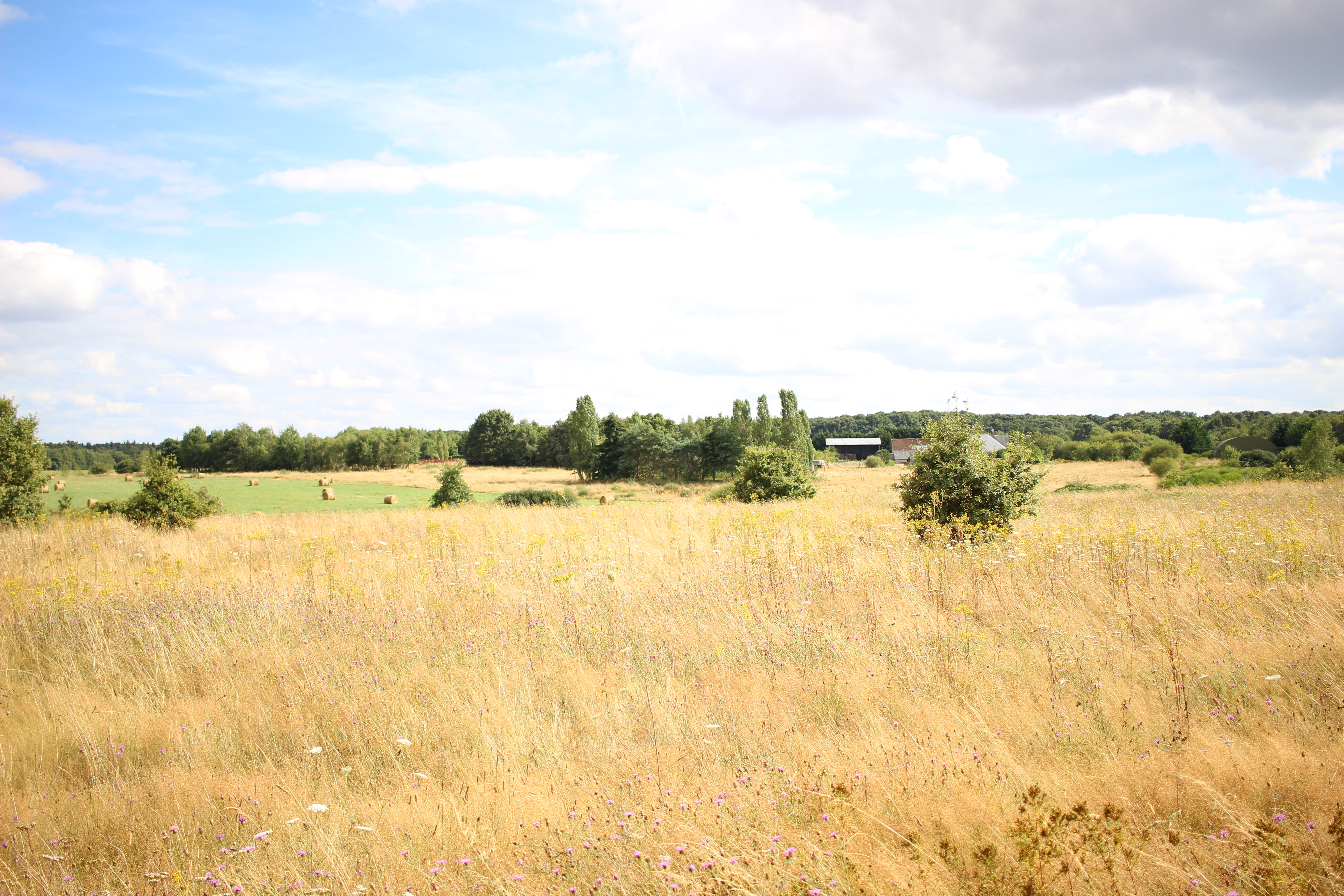 Un champ rue des Vignes à Dame-Marie-les-Bois